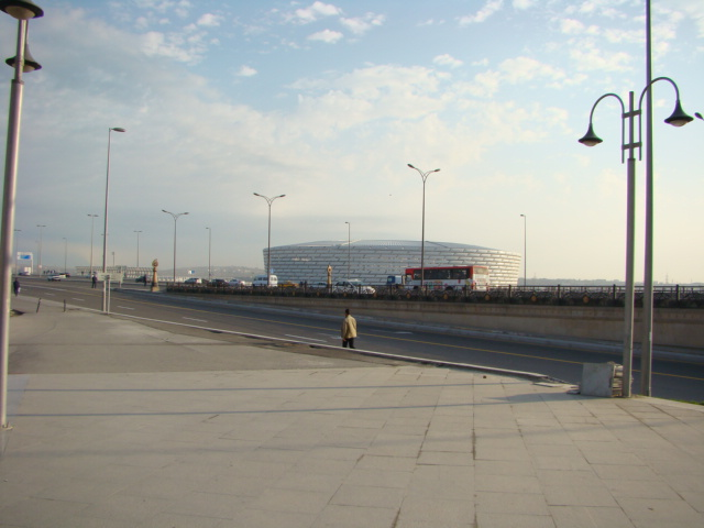 Bakı Olimpiya Stadionunun uzaqdan görünüşü